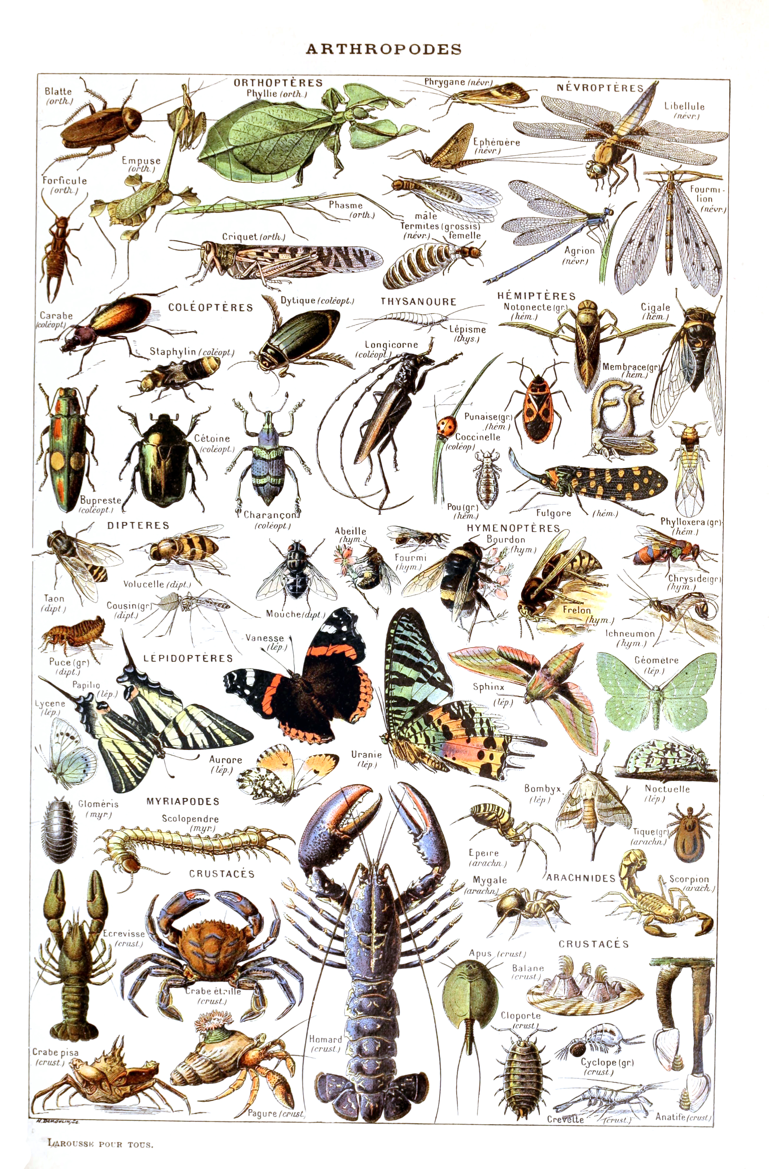 Arthropodes. Illustré par Adolphe Millot dans Larousse pour tous,[1907-1910]